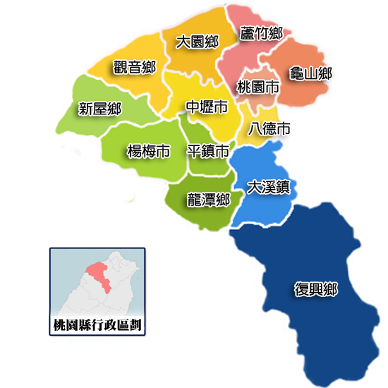 桃園縣地方行政區劃。